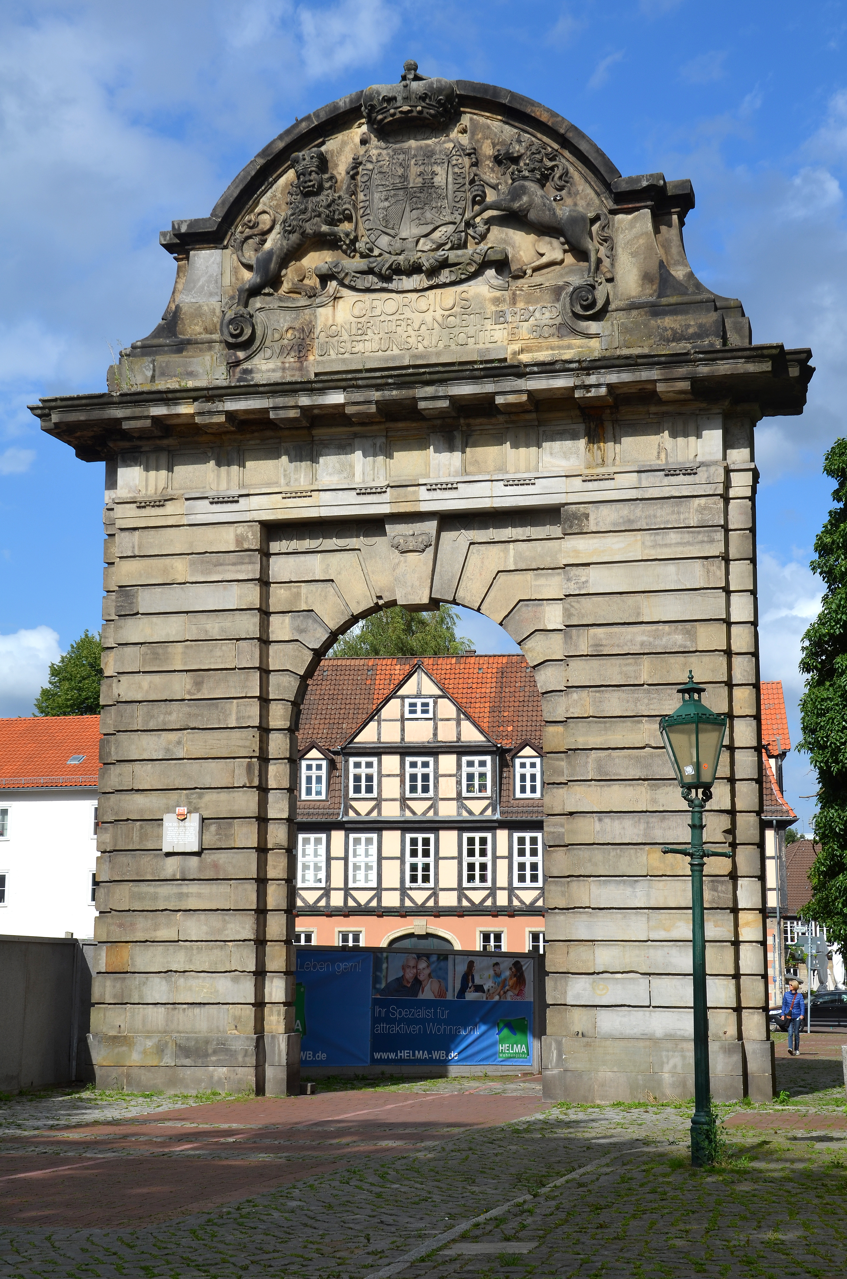 Das Marstalltor am Hohen Ufer als Durchgang zur Straße Roßmühle ...